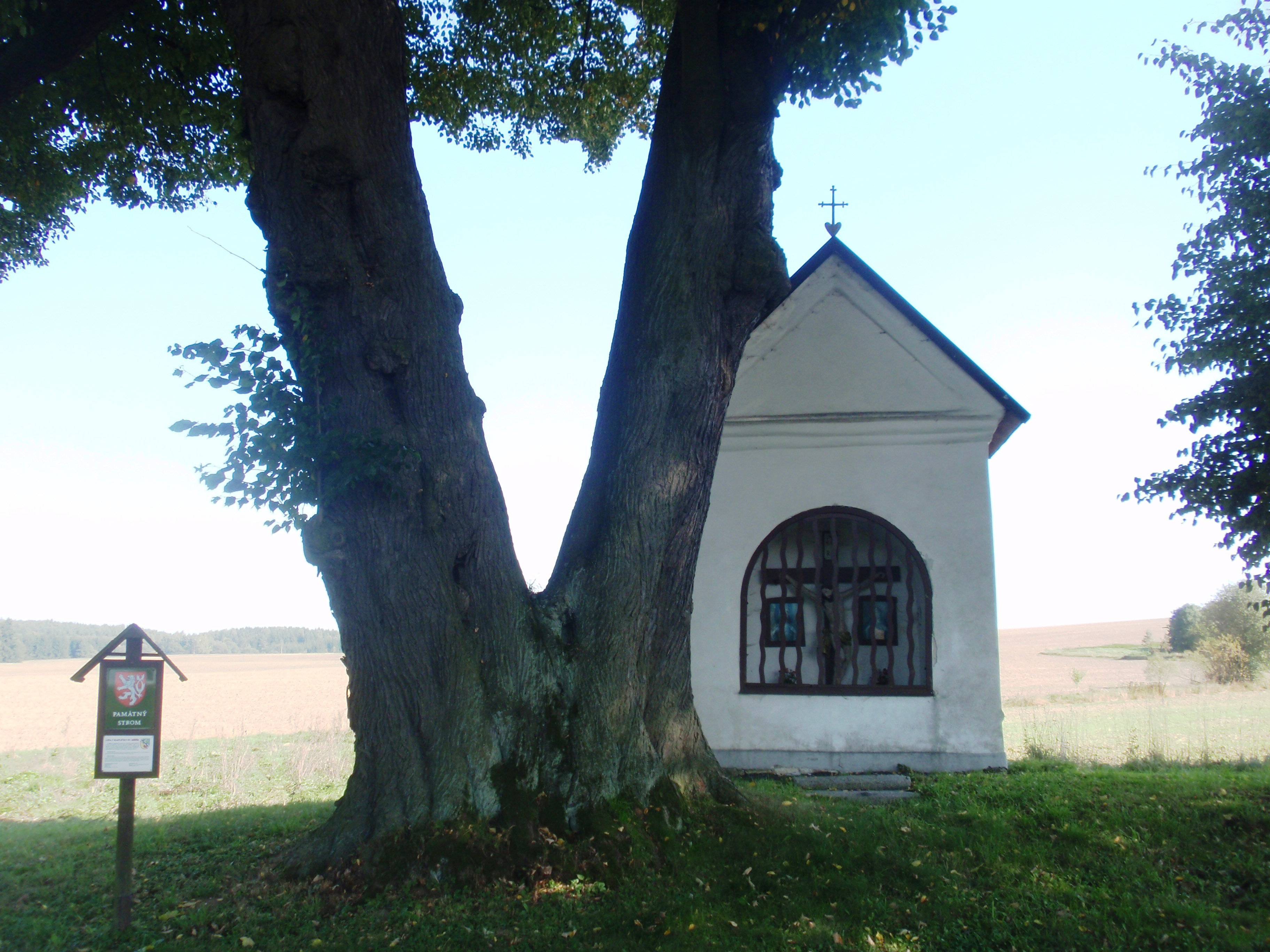 Výklenková kaplička - poklona (Polnička), při cestě do Žďáru, Polnička